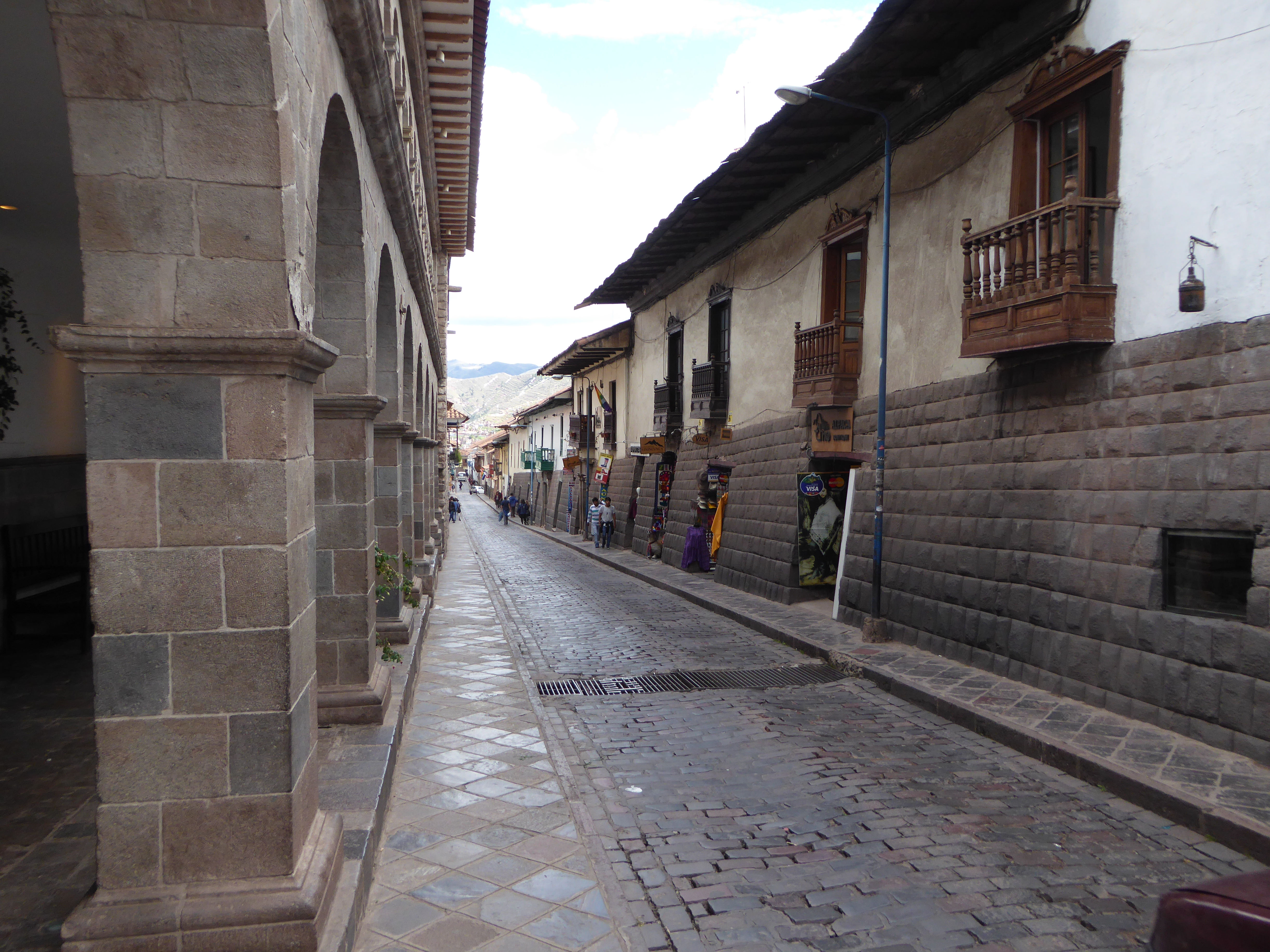 Strasse am JW Marriot Cusco